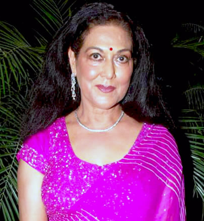 Anjana Mumtaz at Anu Ranjan's Women's Day bash